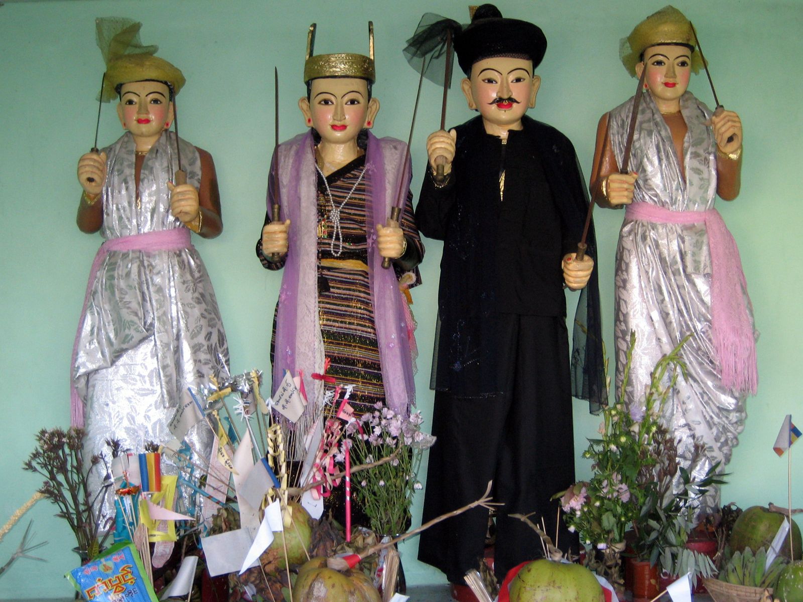 Nat images in Taunggyi, Myanmar